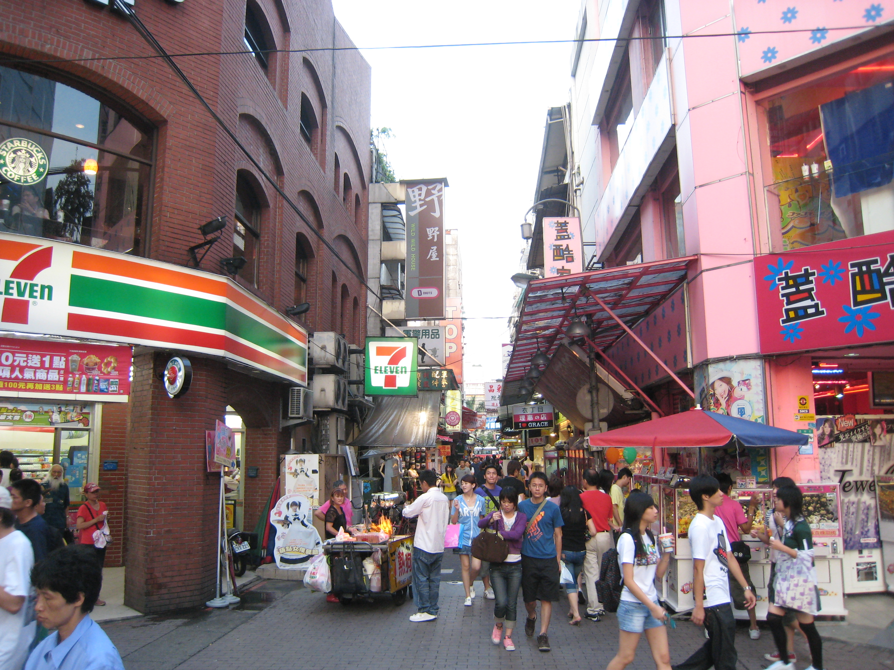 台北市西門町